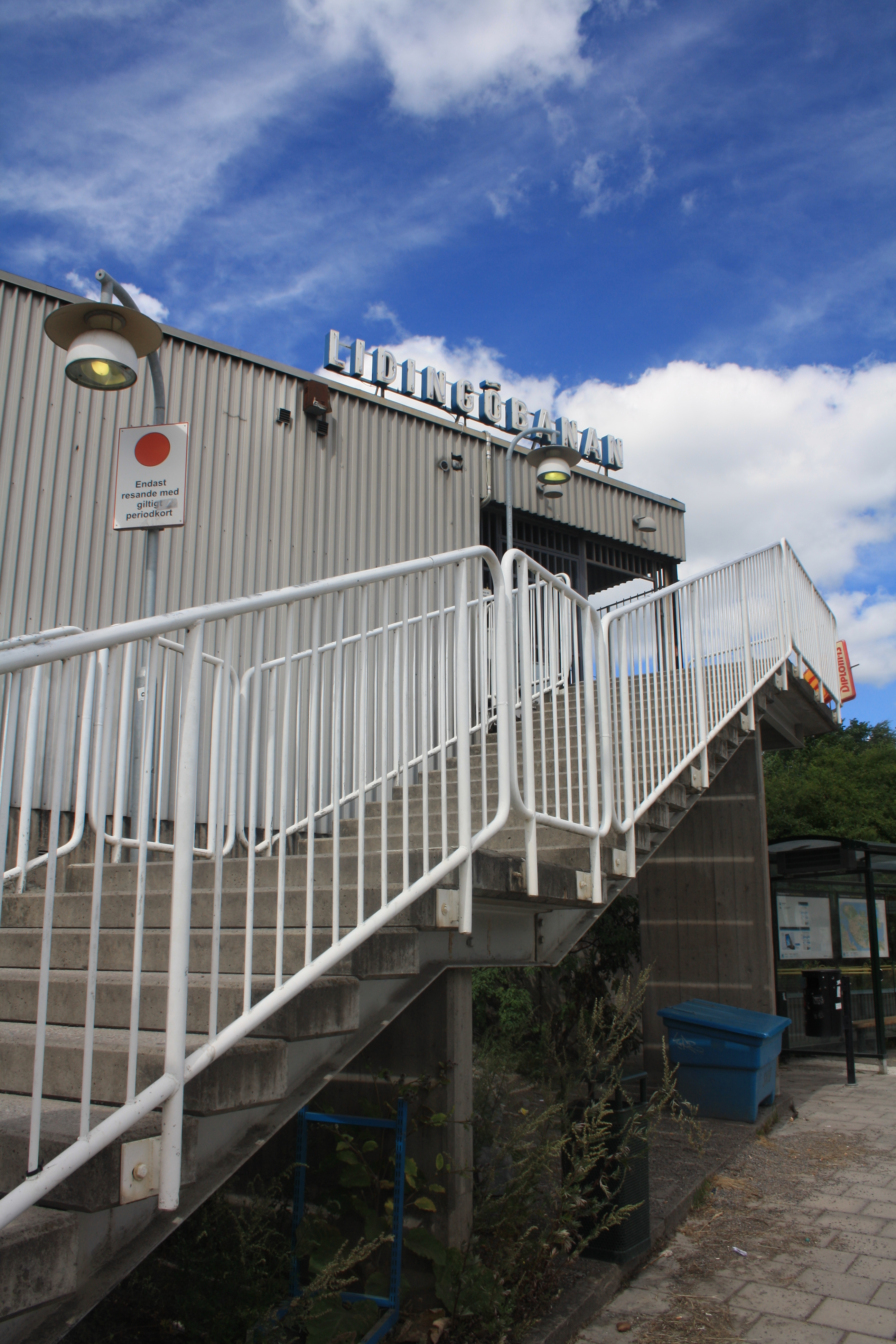 Ingång till Lidingöbanan på Ropsten